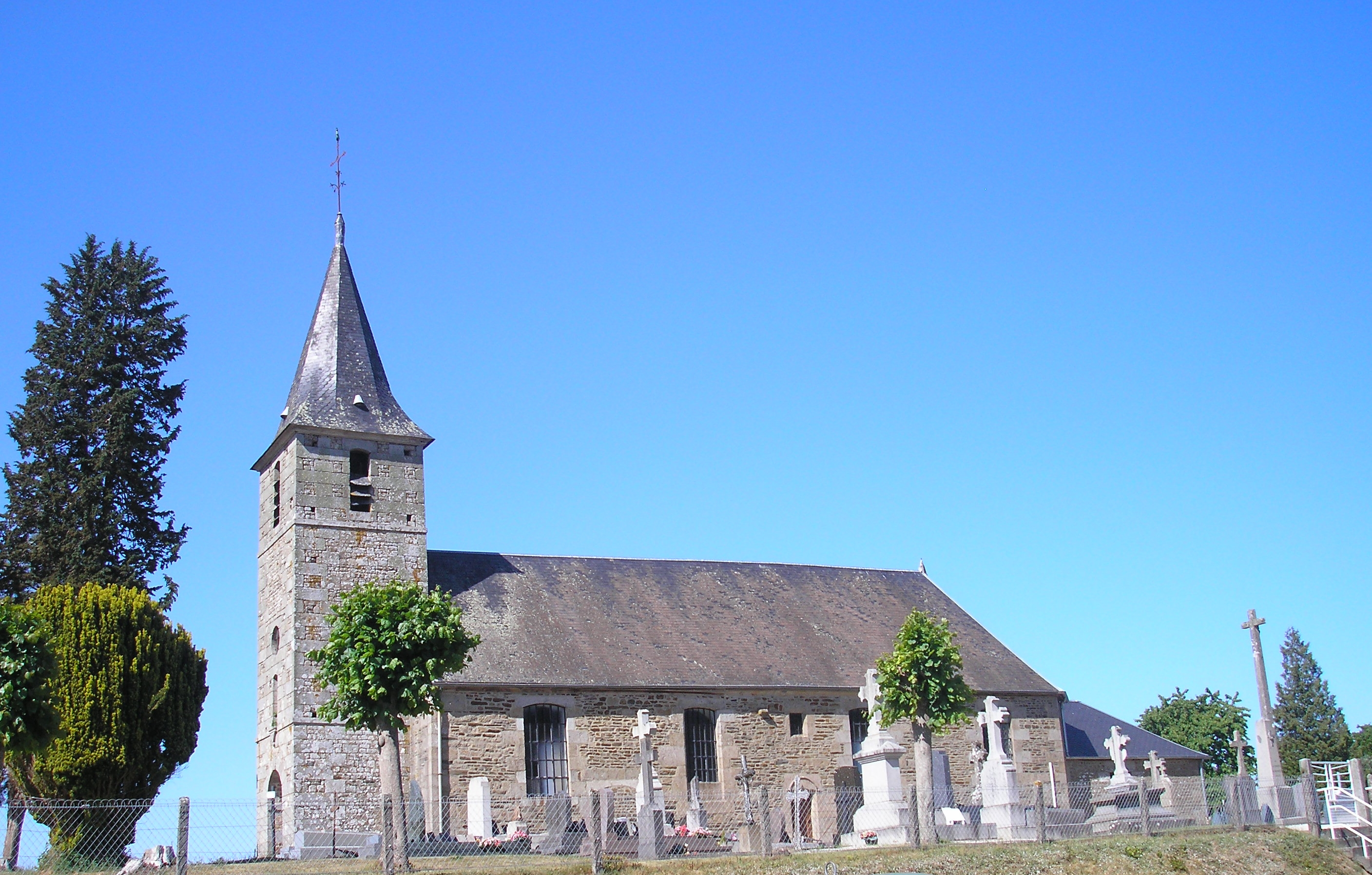 Le Mesnil-Benoist (Normandie, France). L'église Notre-Dame.